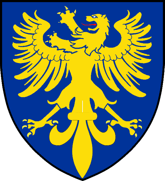 Vapensköld för Knut Jonsson (Aspenasätten)